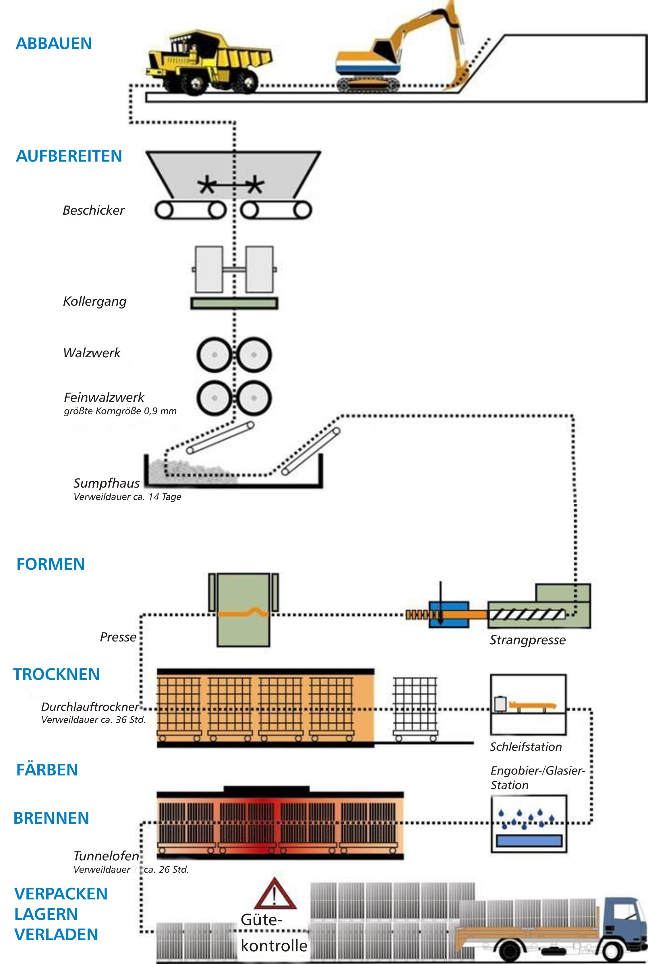 Produktionsablauf